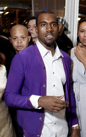 Kanye West in 2007.